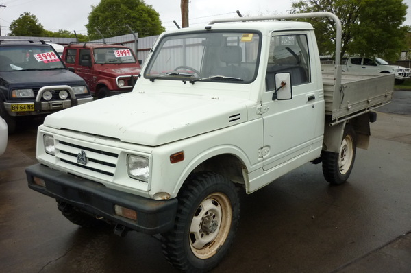 Rebadged Suzuki Sierra